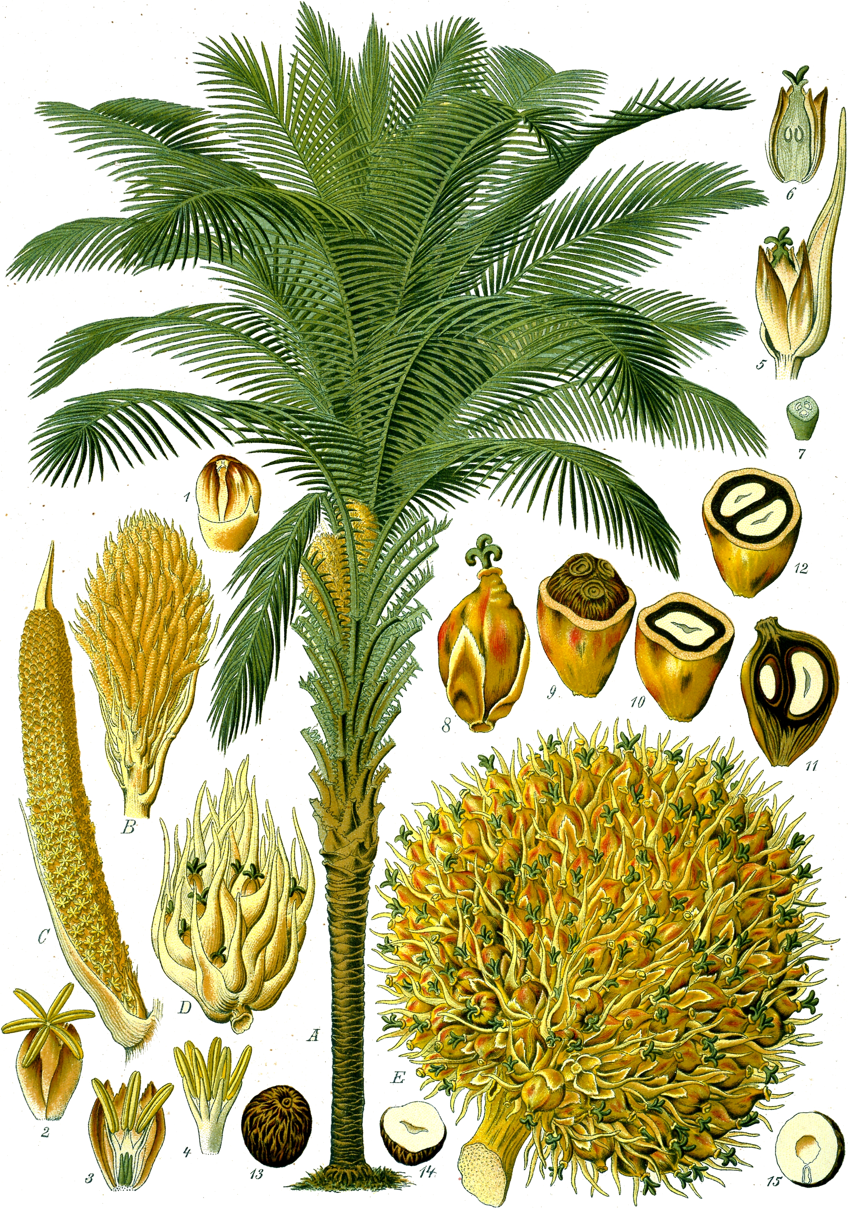 Ölpalme. A Habitusbild der ganzen Pflanze, B Männlicher Blütenstand. C Einzelzweig des männlichen Blütenstandes. D Teil eines weiblichen Blütenstandes. E Fruchtstand. 1 Knospe; 2 männliche Blüte; 3 dieselbe im Längsschnitt; 4 Staminaltubus; 5 weibliche Blüte; 6 dieselbe im Längsschnitt; 7 Fruchtknoten im Querschnitt; 8 Frucht; 9 dieselbe, nachdem die obere Hälfte des Fruchtfleisches entfernt ist; 10 Steinkern im Querschnitt; 11 derselbe im Längsschnitt; 12 ein zweisamiger Steinkern im Querschnitt; 13 Same; 14 derselbe im Querschnitt; 15 derselbe im Längsschnitt.